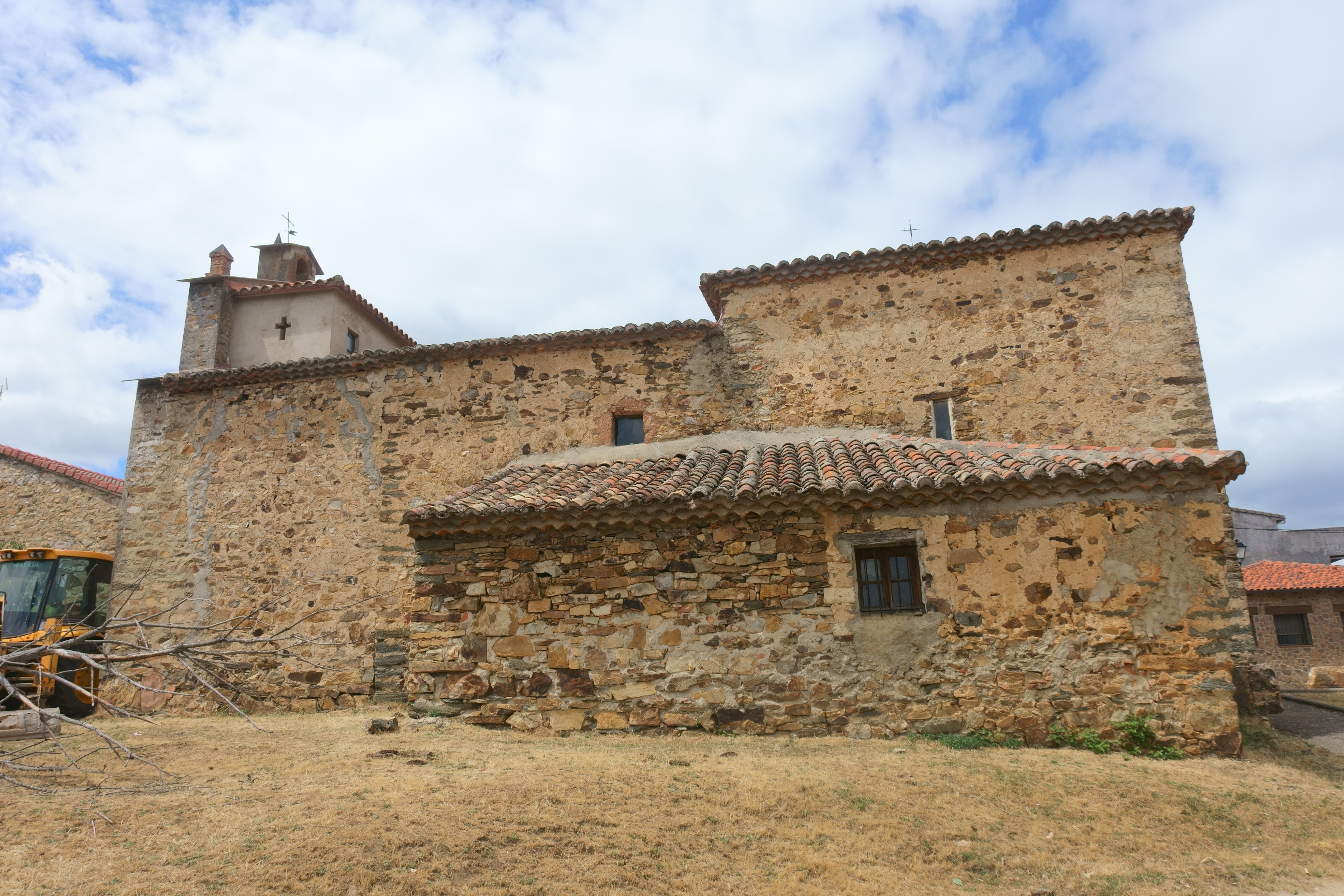 Iglesia de San Sebastián, El Ordial (Guadalajara, España).